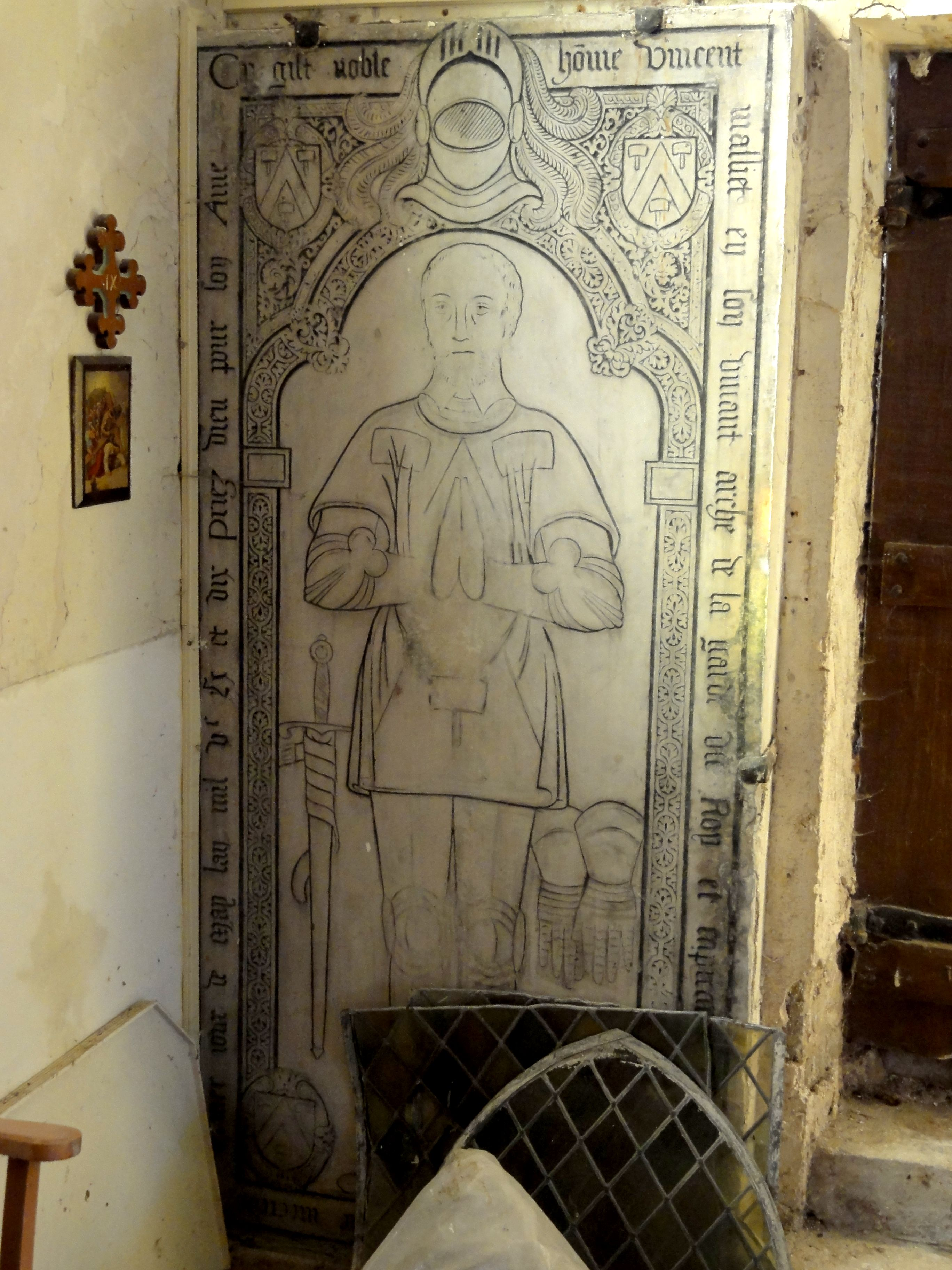 Dalle funéraire de Vincent Malliet, mort le 31 mai 1570.